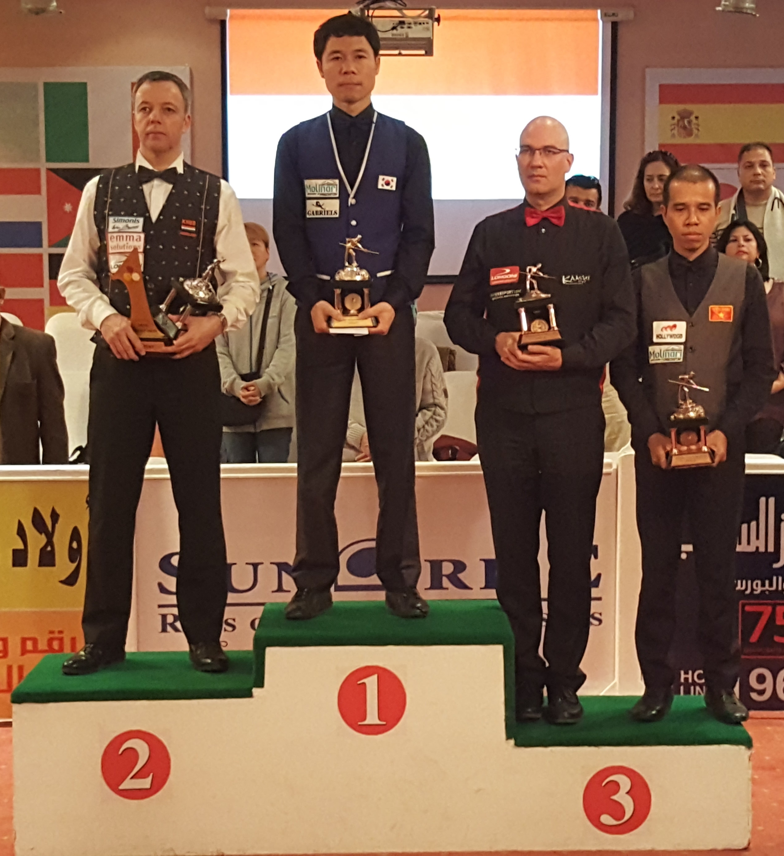 2016 3-Cushion World Cup-Award Ceremony-1 cropped